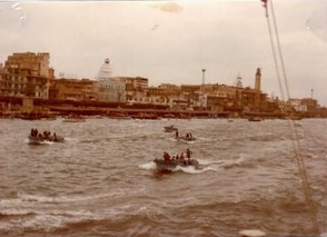 מעבר ספינת טילים אח"י תרשיש (סער 4) בתעלת סואץ